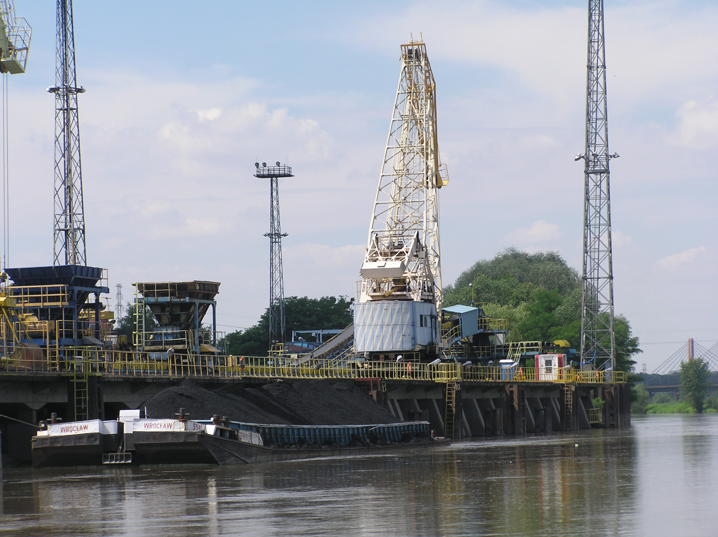 Wrocław, Kleczków, Odra - Kanał Miejski/Stara Odra, Przeładownia Elektrociepłowni Wrocław